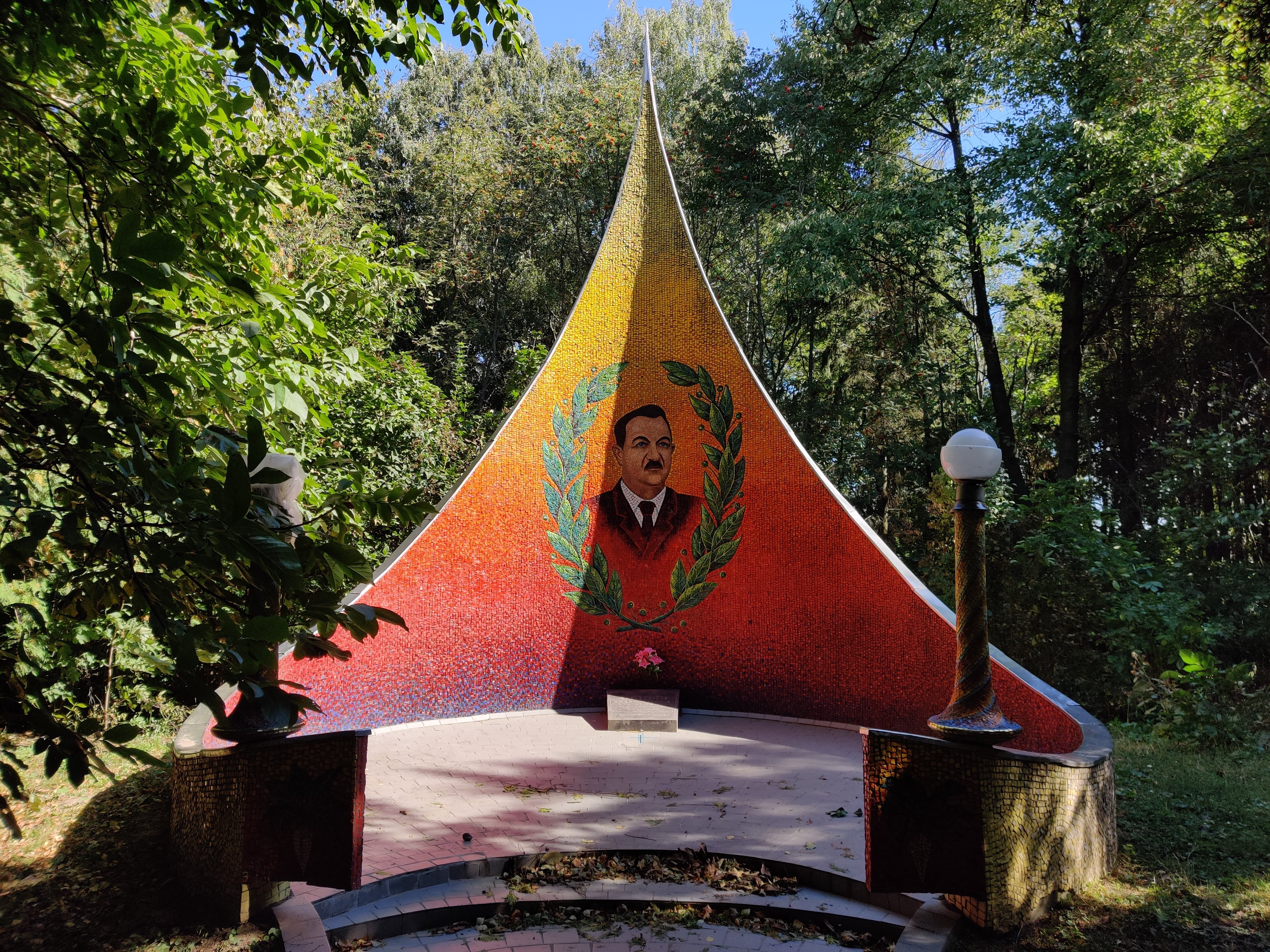 Попов Олексендр Васильович пам'ятна стела